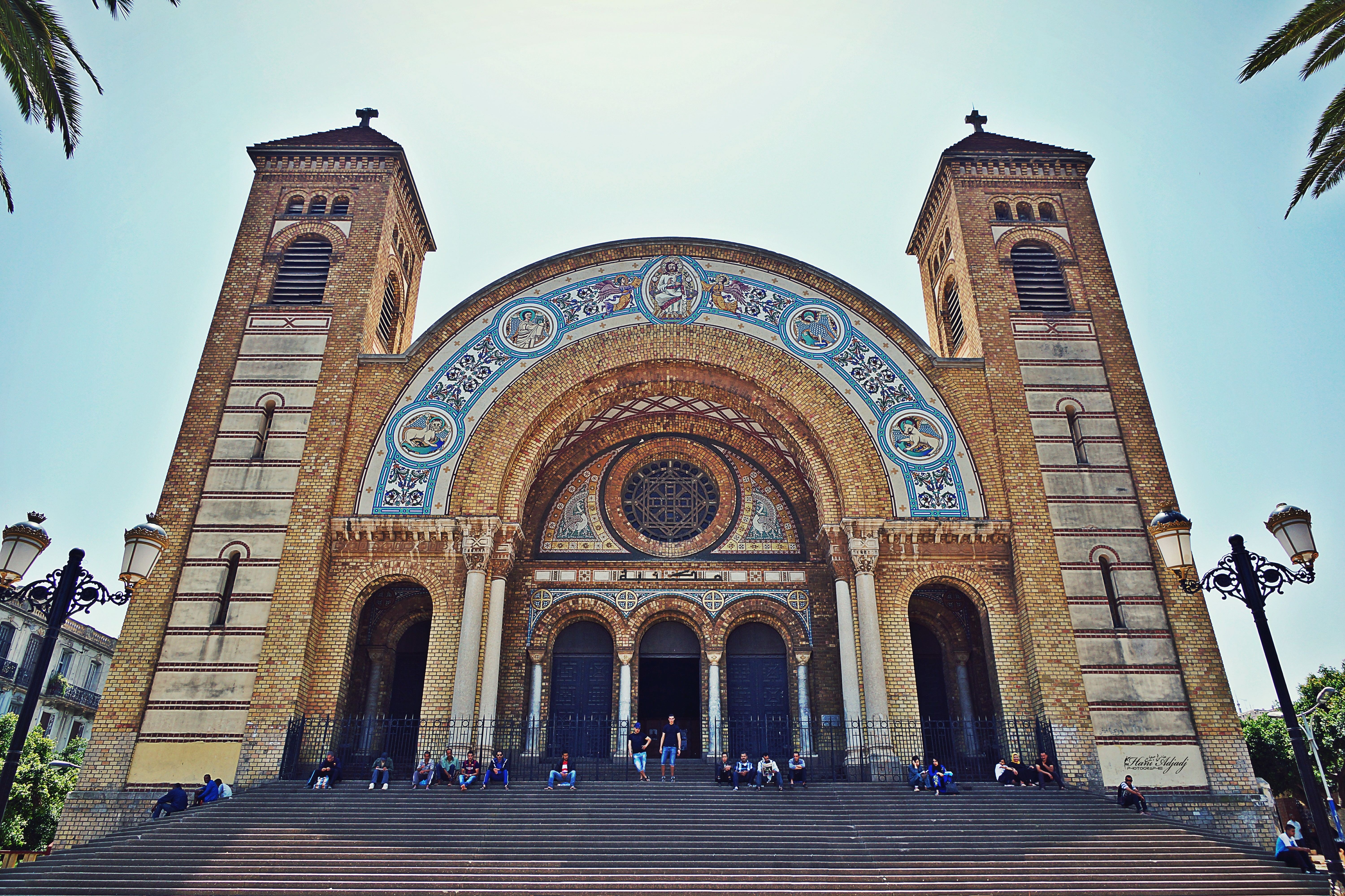 La cathédrale du Sacré-Cœur d'Oran (Algérie), (Bibliothéque Régionale d'Oran) de style romano-byzantin, fut édifiée de 1904 à 1913.